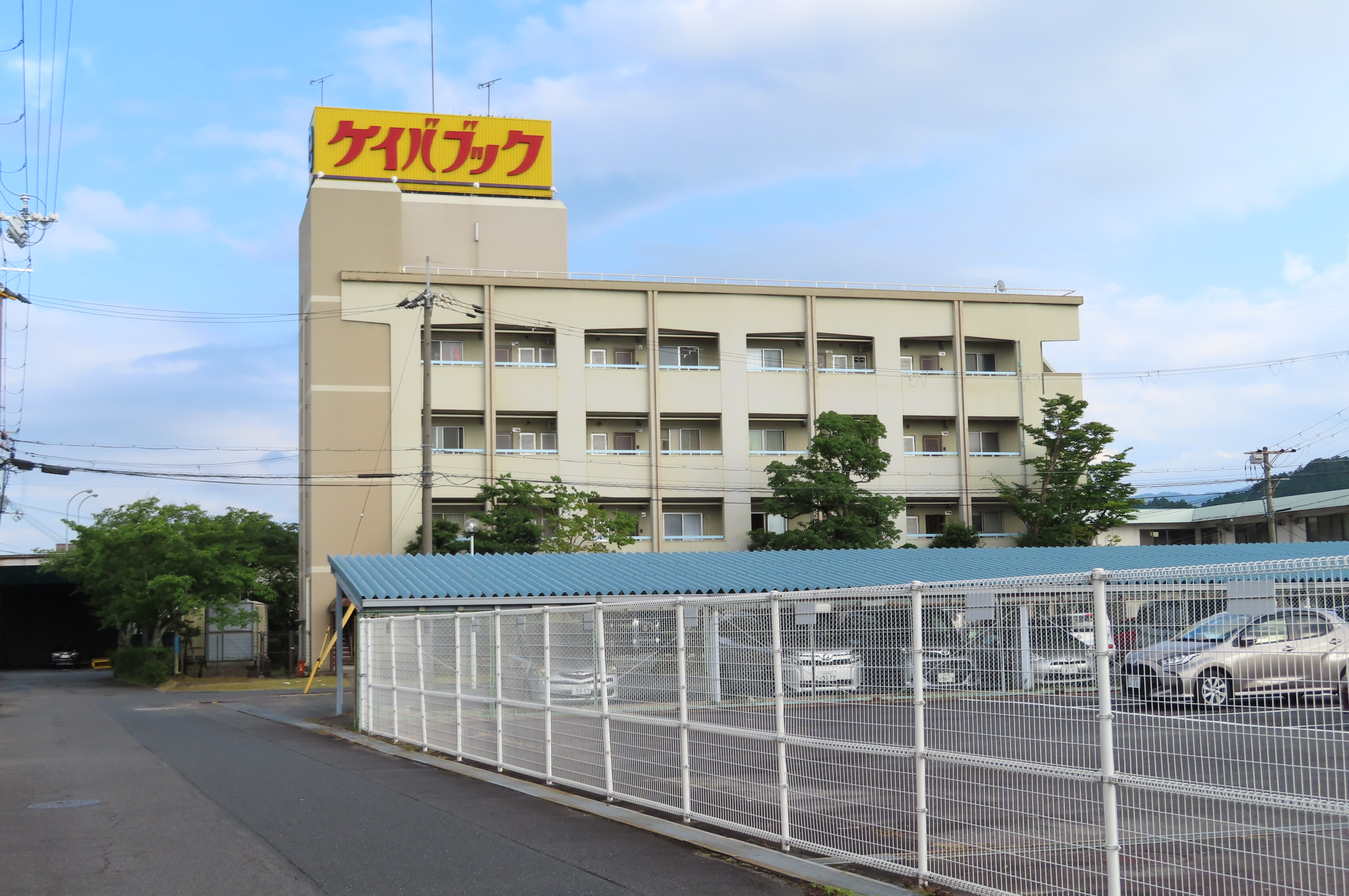 競馬ブック本社（滋賀県栗東市）。2017年撮影